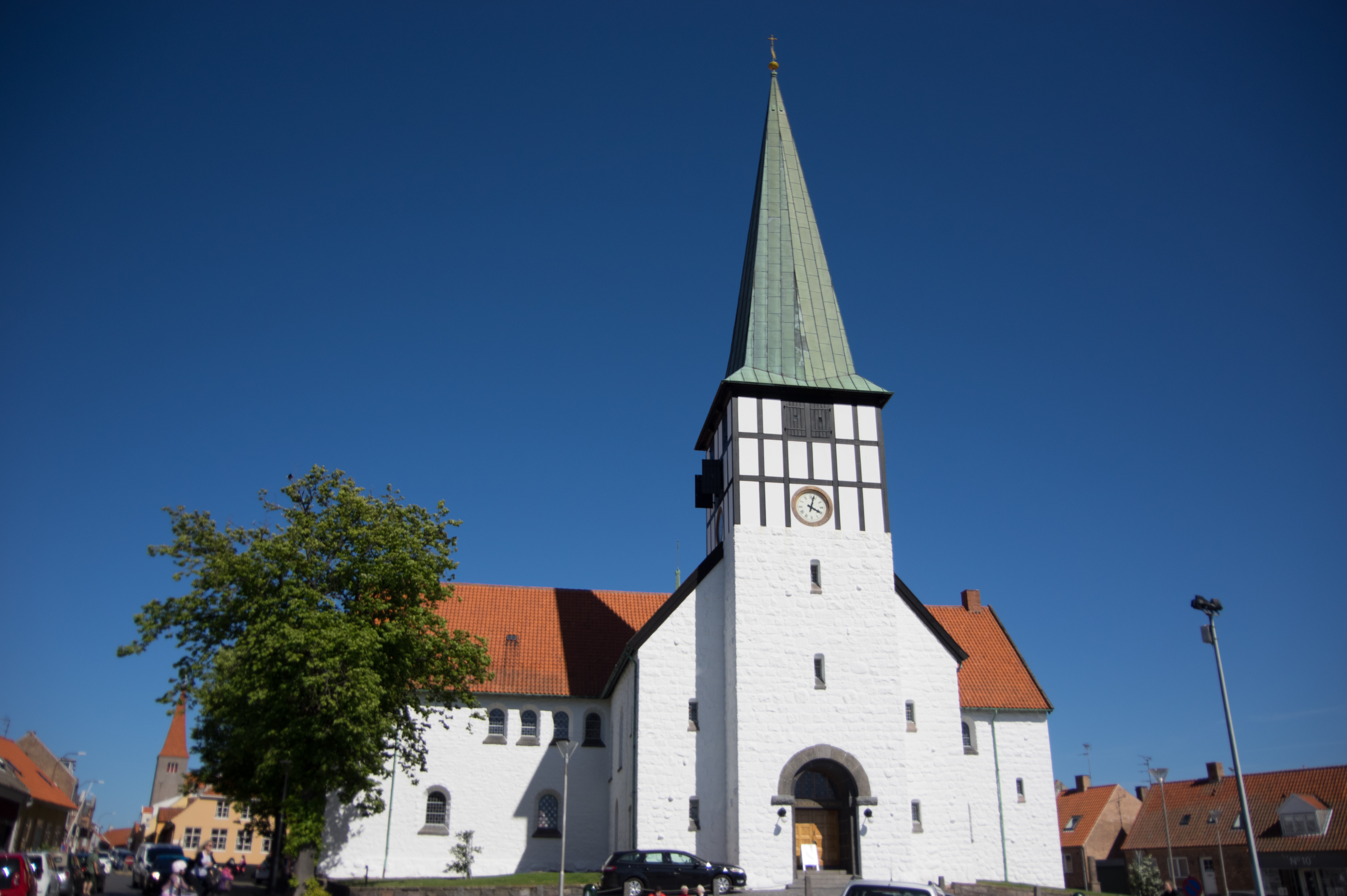 Rønne auf Bornholm. Die Nikolaikirche der Stadt in der Nähe des Hafens.